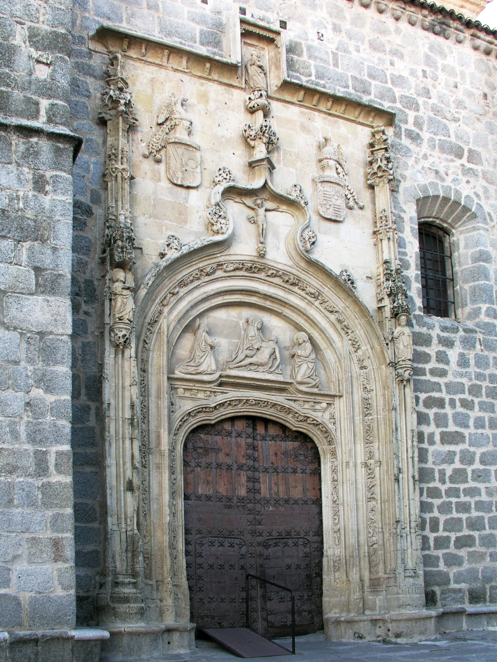 Colmenar Viejo, Madrid, Spain. Basílica de la Asunción de Nuestra Señora de Colmenar Viejo. Portal.